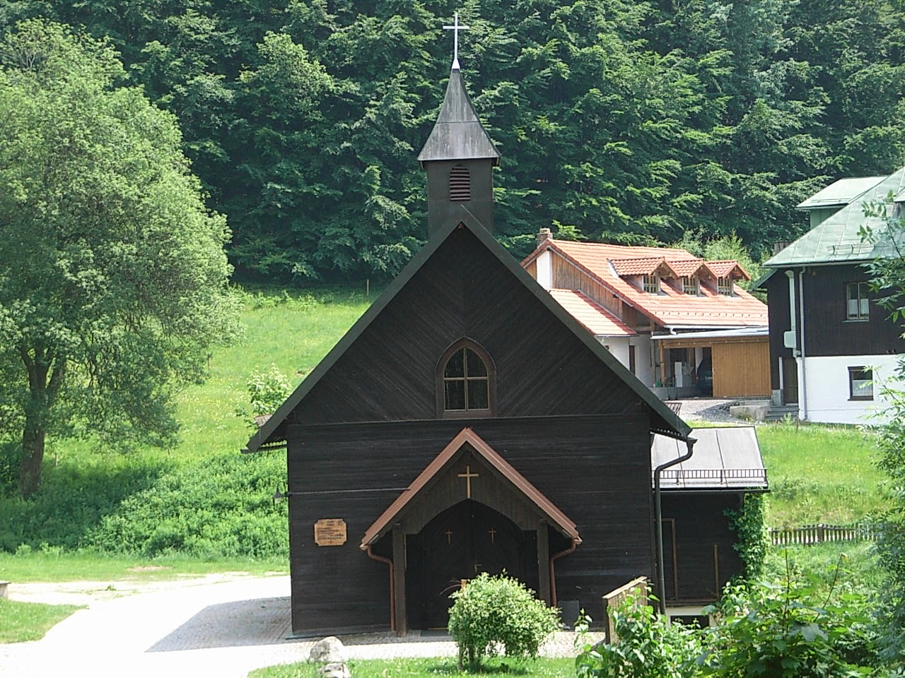 Filialkirche St. Stephanus in Spiegelhütte